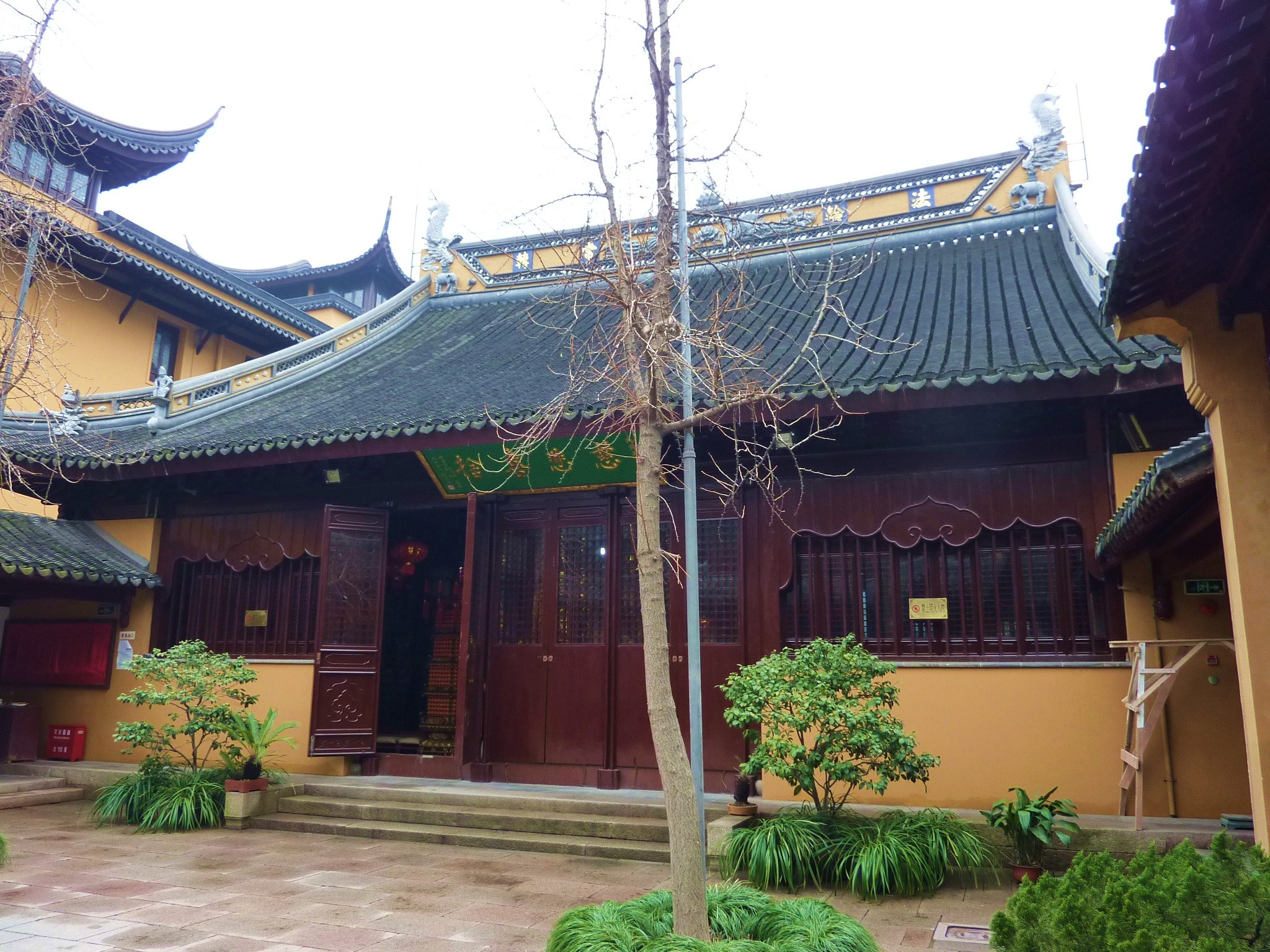 ·˙·ChinaUli2010·.· Shanghai